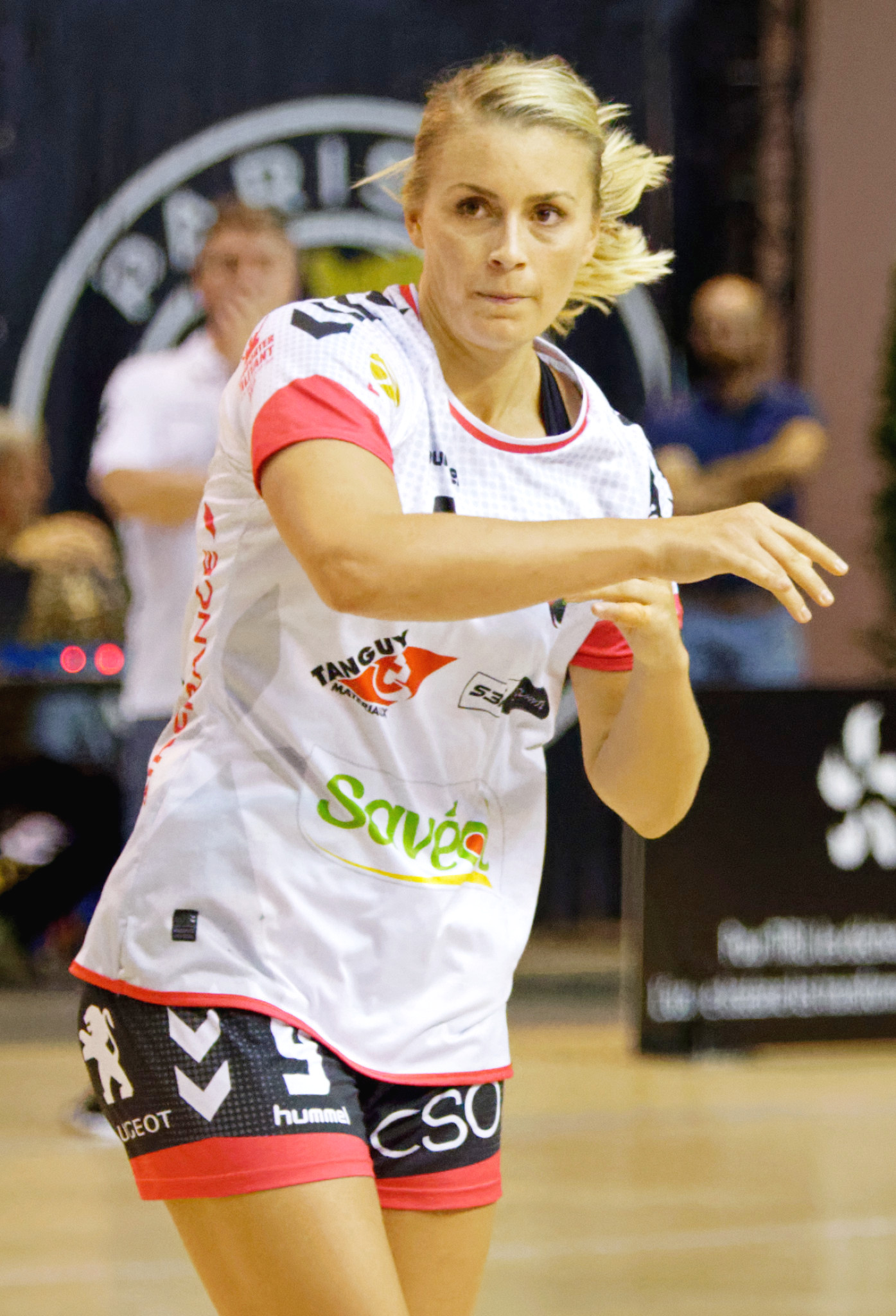 Rencontre de LFH entre Paris 92 et Brest Bretagne Handball. A la Halle Carpentier (Paris), le 05 septembre 2018.